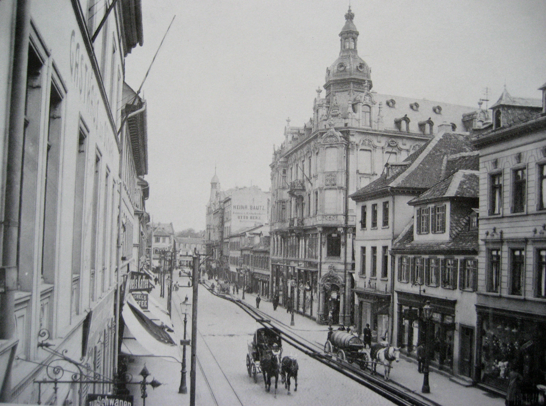 Frankurter Straße in Offenbach am Main (1900)